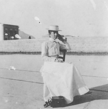 Louise Hamilton Caico a Montedoro